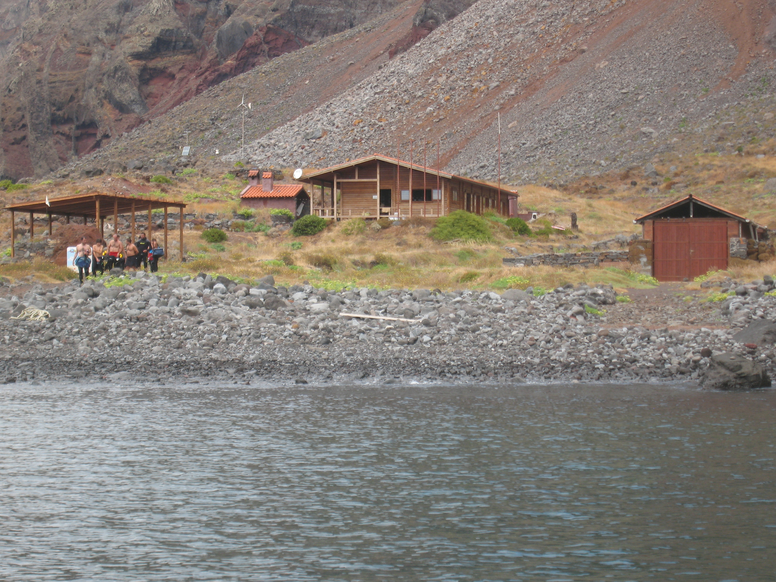 Zicht op de nederzetting van de bewakers